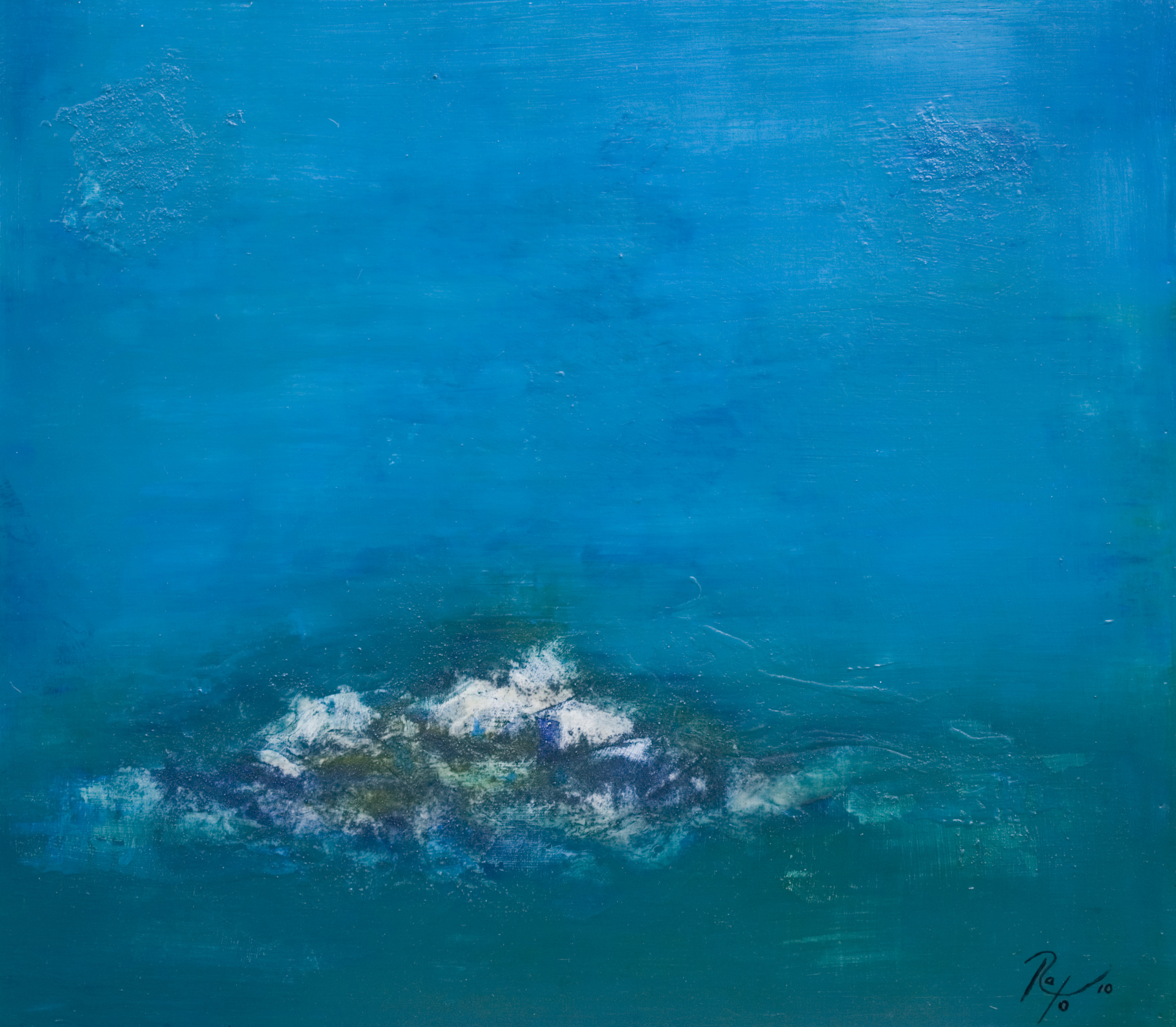 Exposición "Inselberg" de Rafael Torres Correa. Galería del ENCRE (ENsemble Culturel REgional). Cayenne 2011